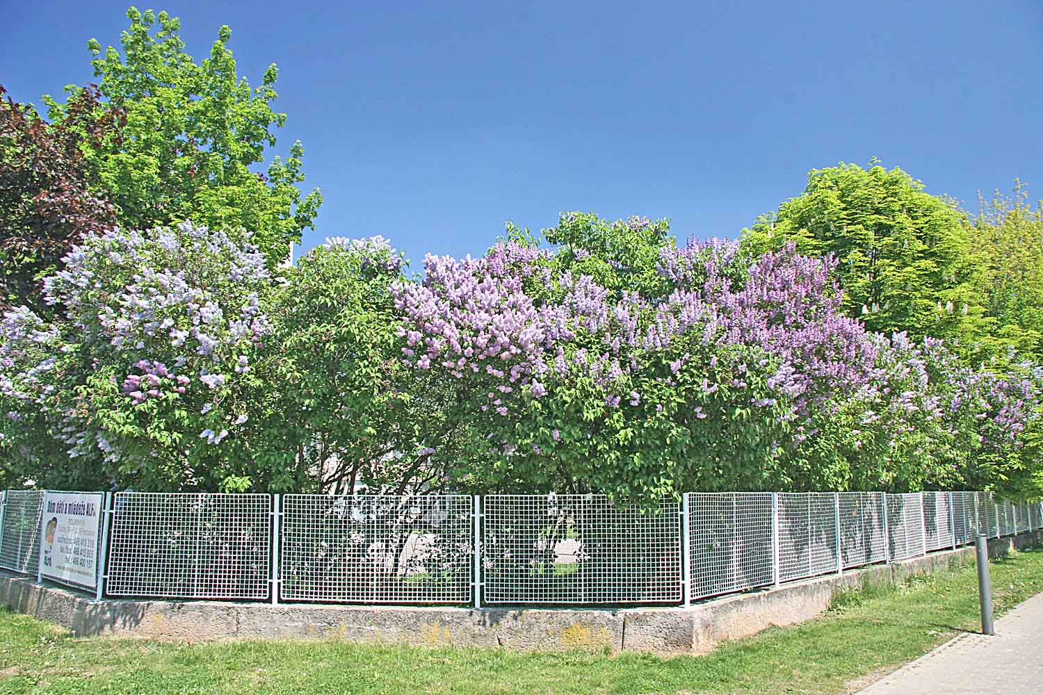 Syringa vulgaris autor:Prazak